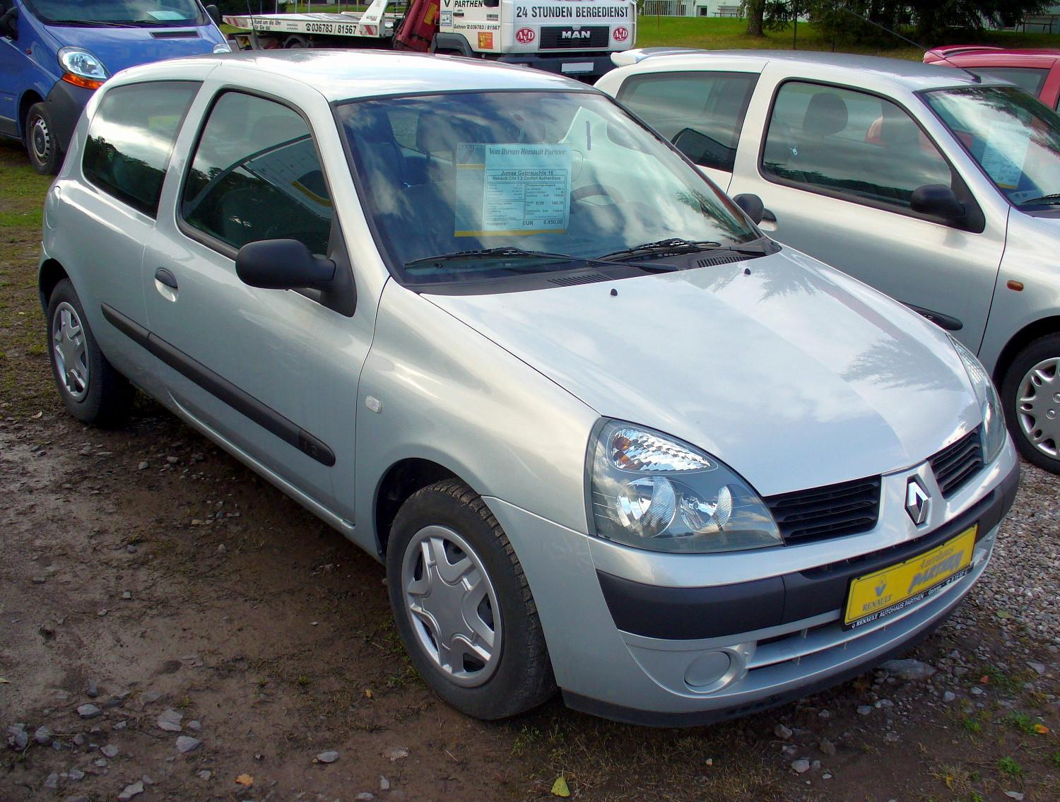 Renault Clio II facelift